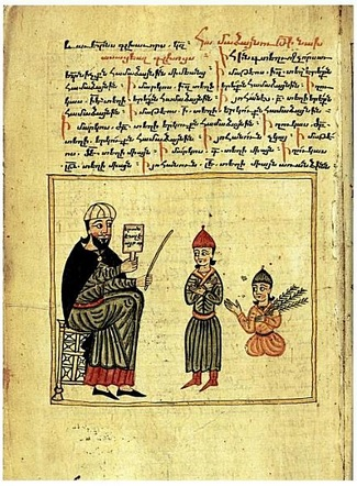 Григор Хлатеци, миниатюра. Матенадаран, № 3714